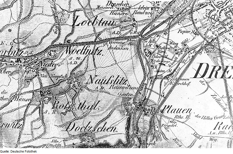 Original image description from the Deutsche Fotothek Dresden-Plauen. Ausschnitt aus: Oberreit, Sect. Dresden, 1821/22